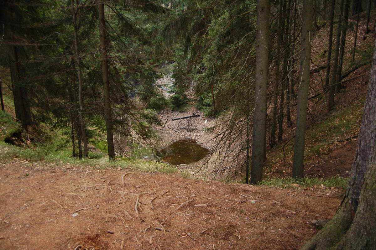 Zielony Stawek